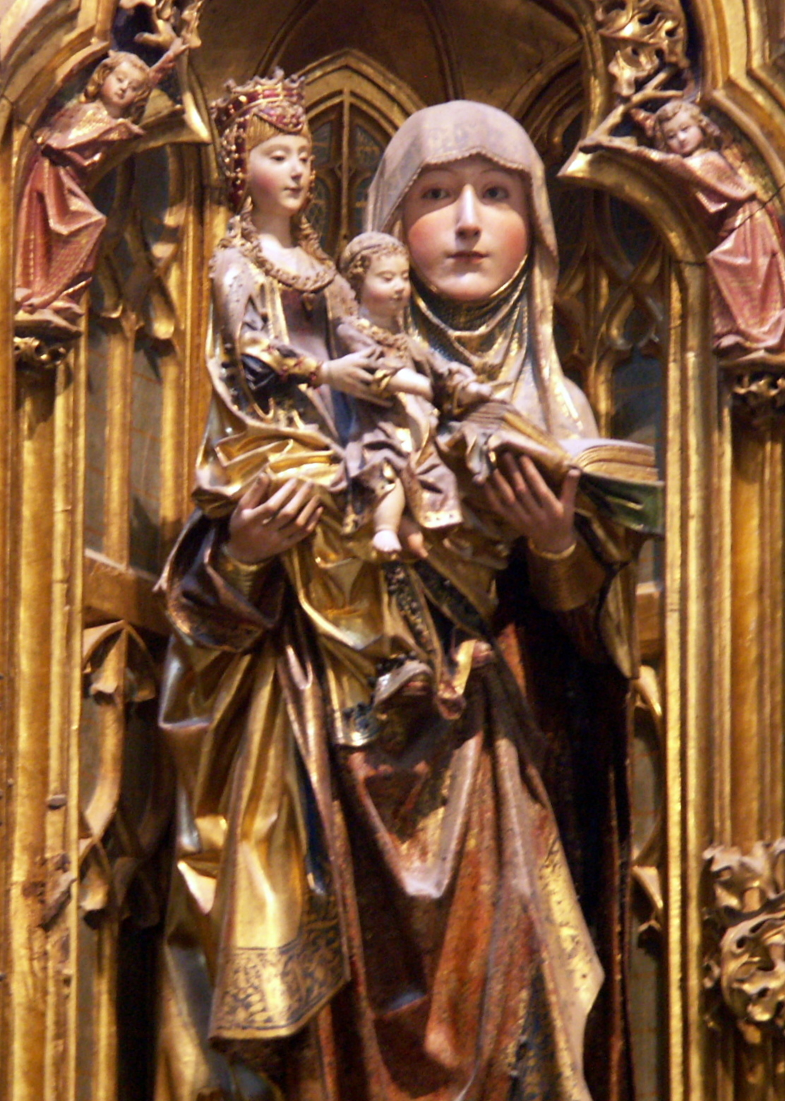 St. Anna Selbdritt, Kathedrale von Burgos [Weltkulturerbe], Spanien, in der Capilla del Condestable